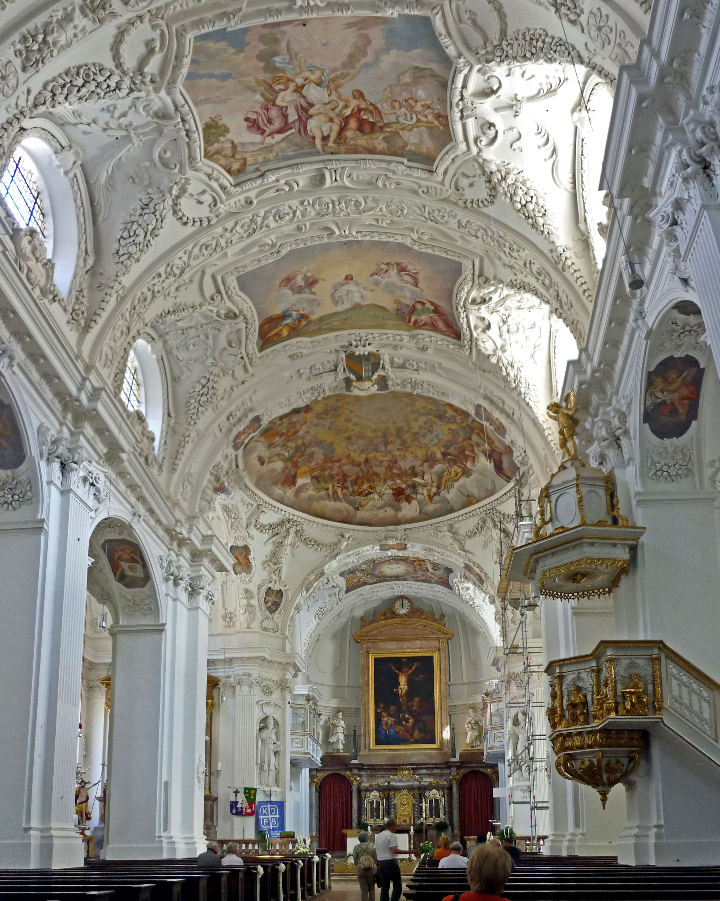 Pfarrkirche St. Quirin in TegernseeThis is a photograph of an architectural monument.